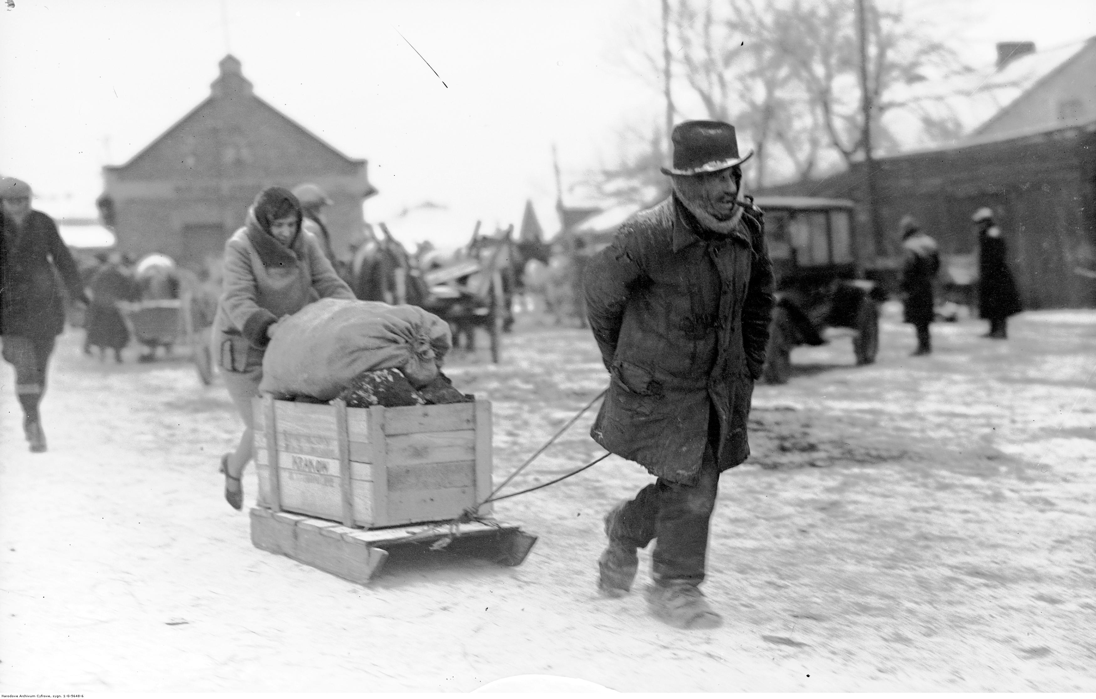 Luty 1929 roku w Krakowie. Tzw. Zima Stulecia. Mężczyzna ciągnący sanie z węglem